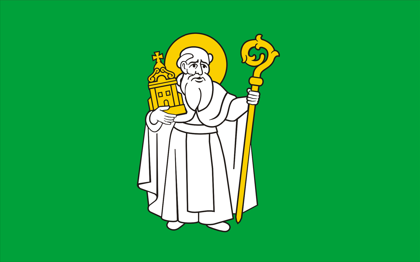 Flaga gminy Suwałki.